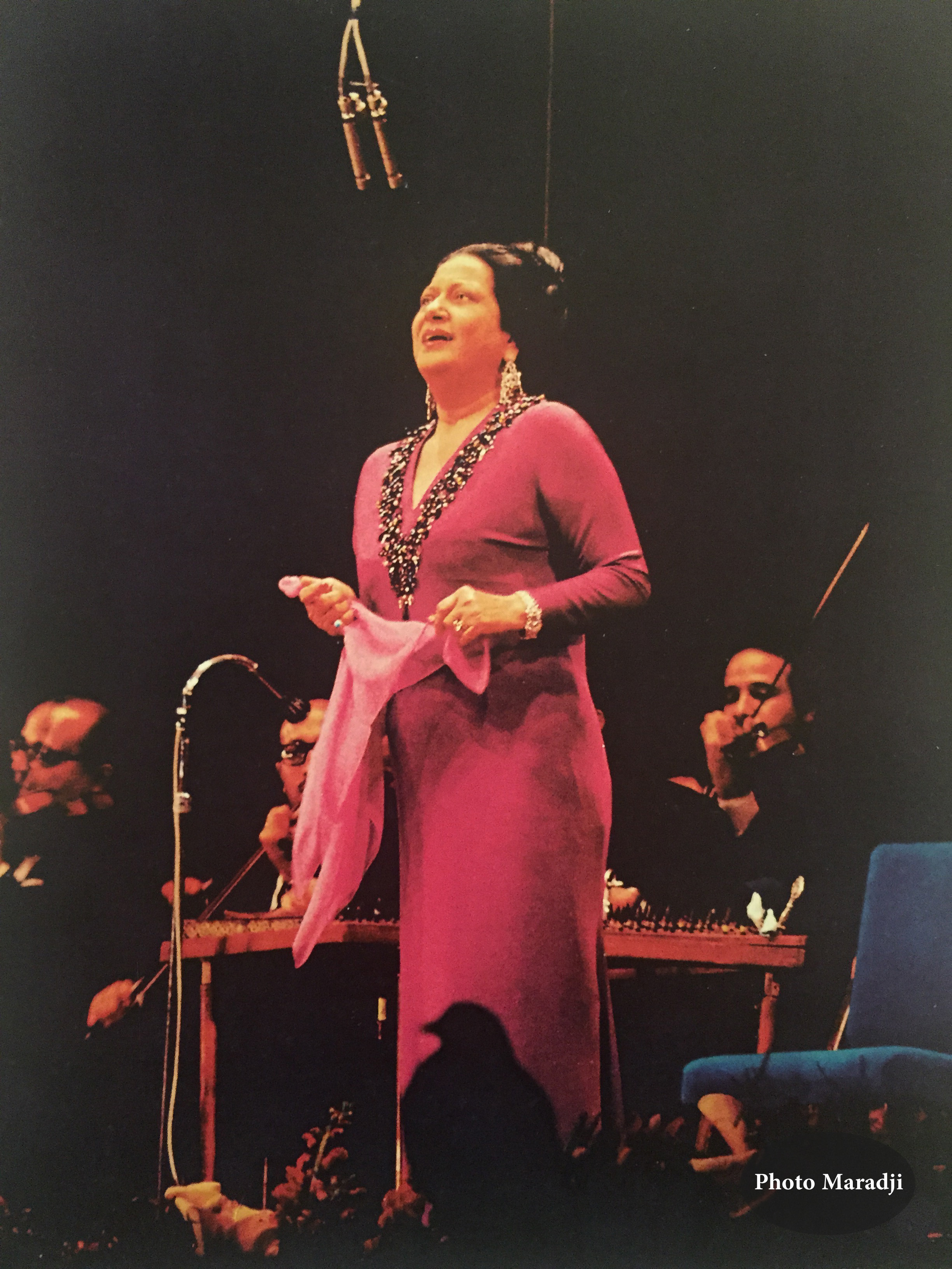 Rabat 1968: Oum Kaltoum au Théâtre Mohammed V. Un pigeon s'est posé près de la grande diva et succombe au charme de sa voix.